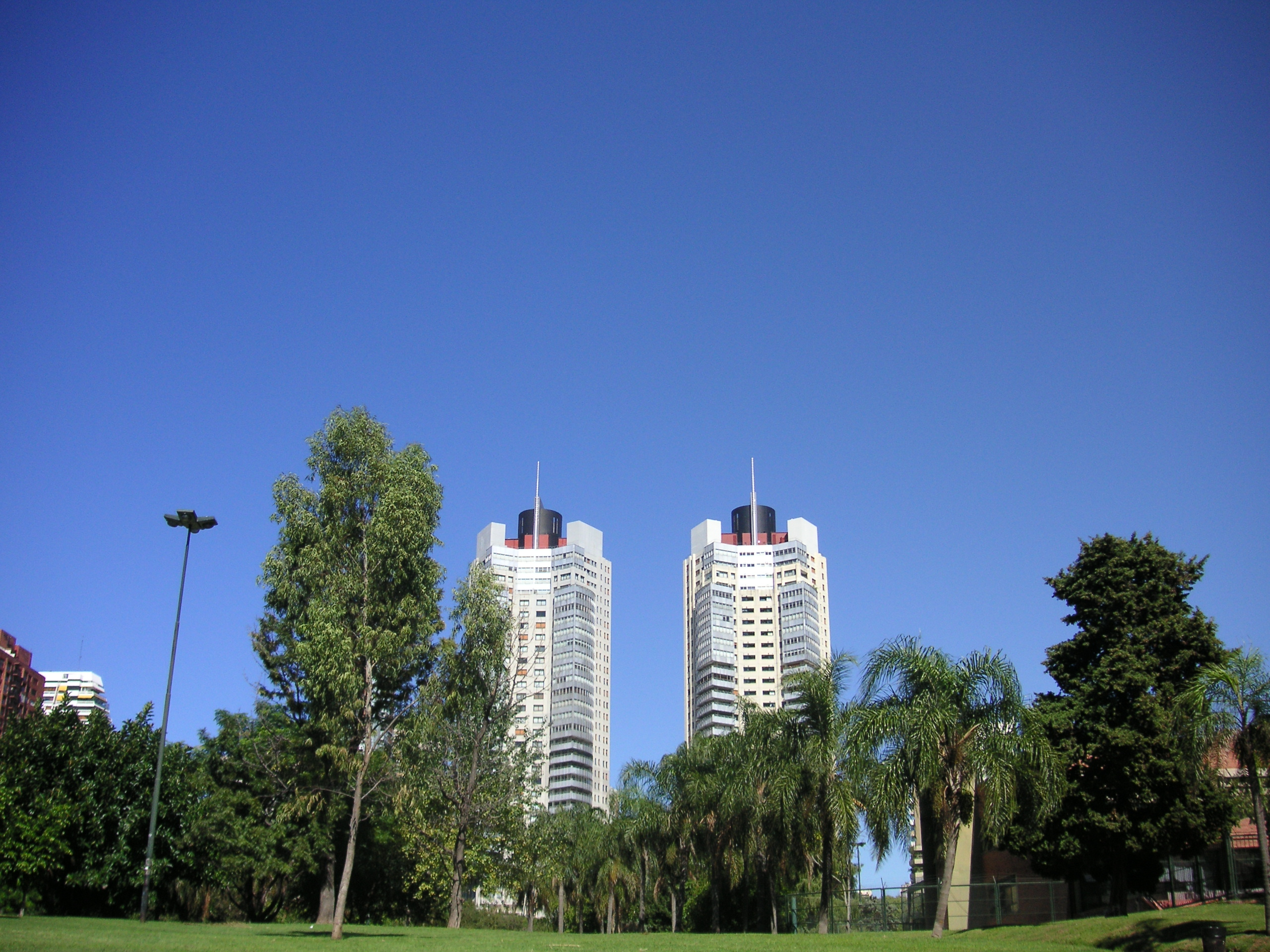 Las Heras Park, Buenos Aires.